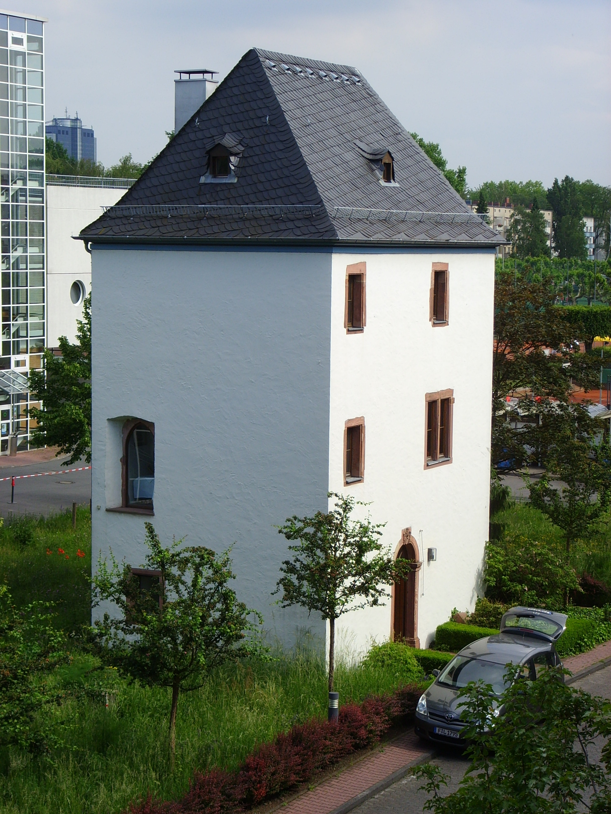 Kühhornshofturm, heute auf dem Gelände des Hessischen Rundfunks (hr), Frankfurt am Main, erbaut: vermutlich 16. Jahrhundert